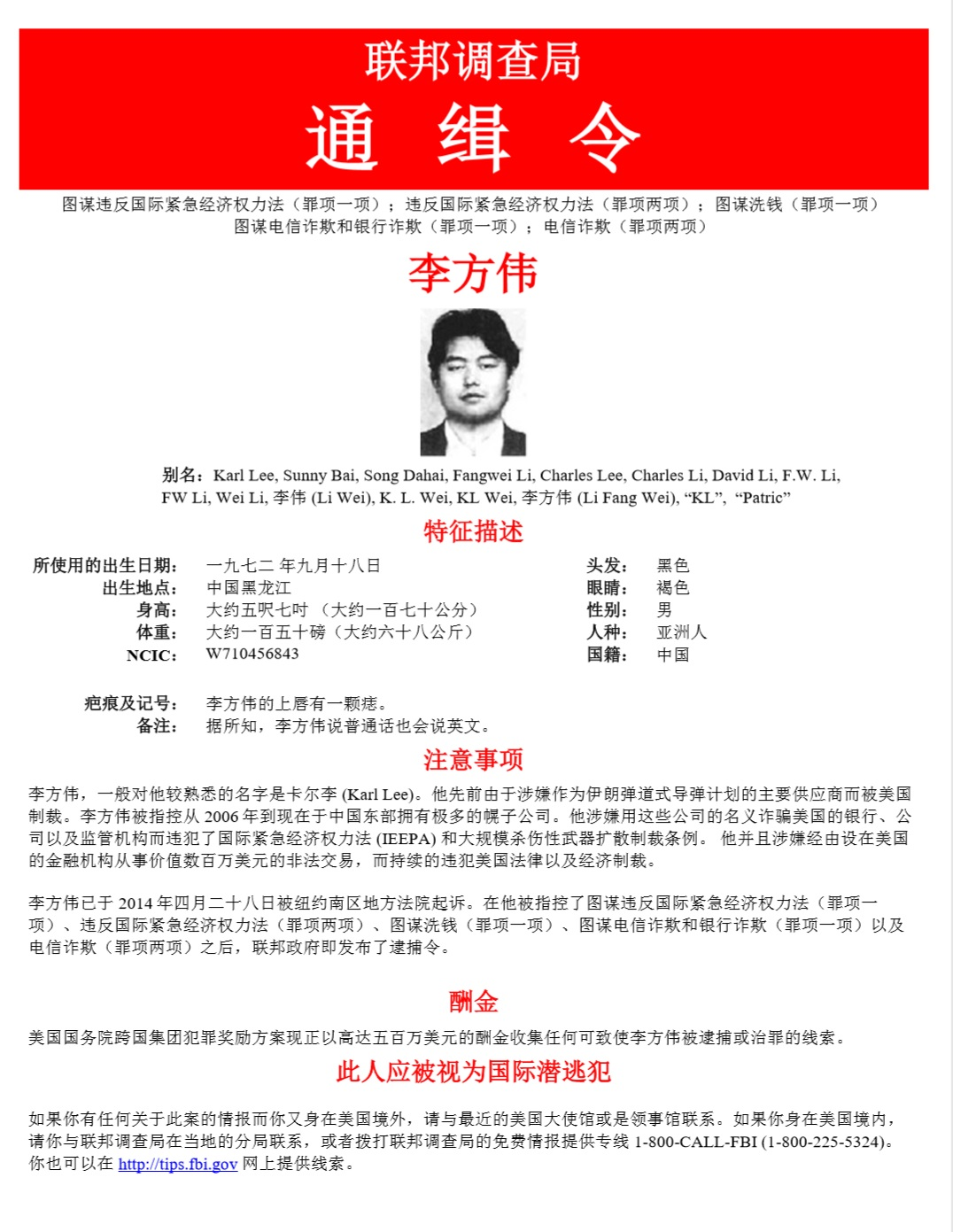 联邦调查局为逮捕李方伟而公布的通缉令